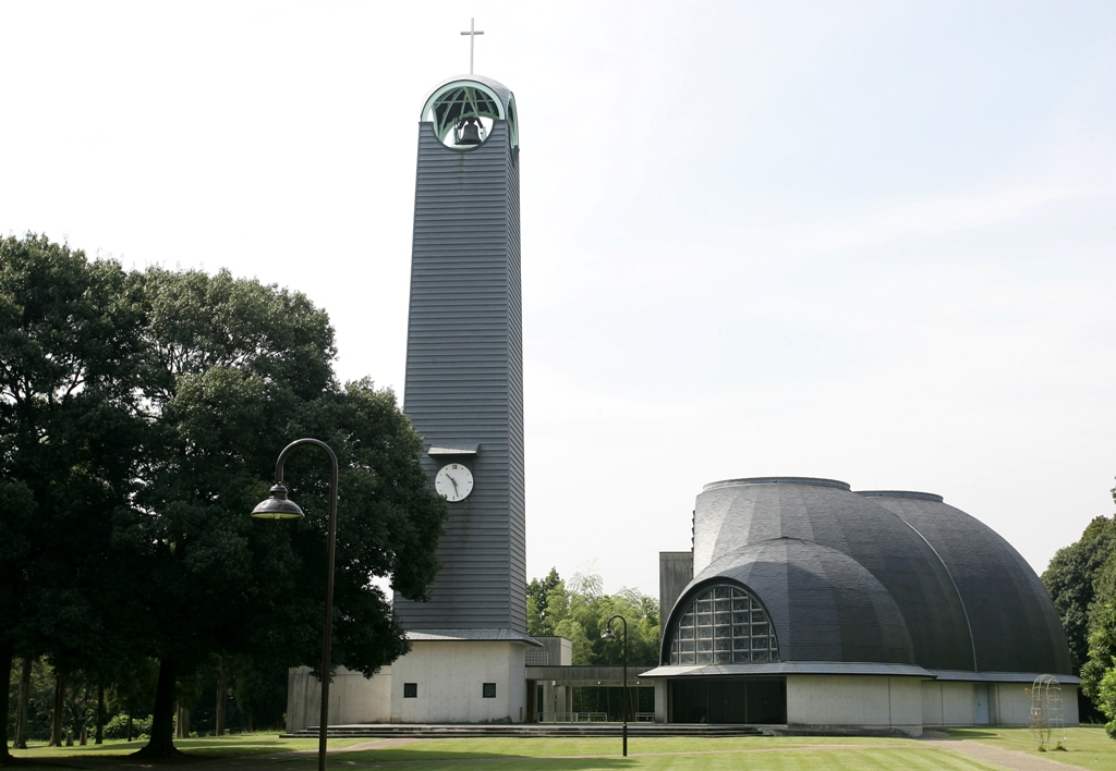 東京基督教大学のチャペル